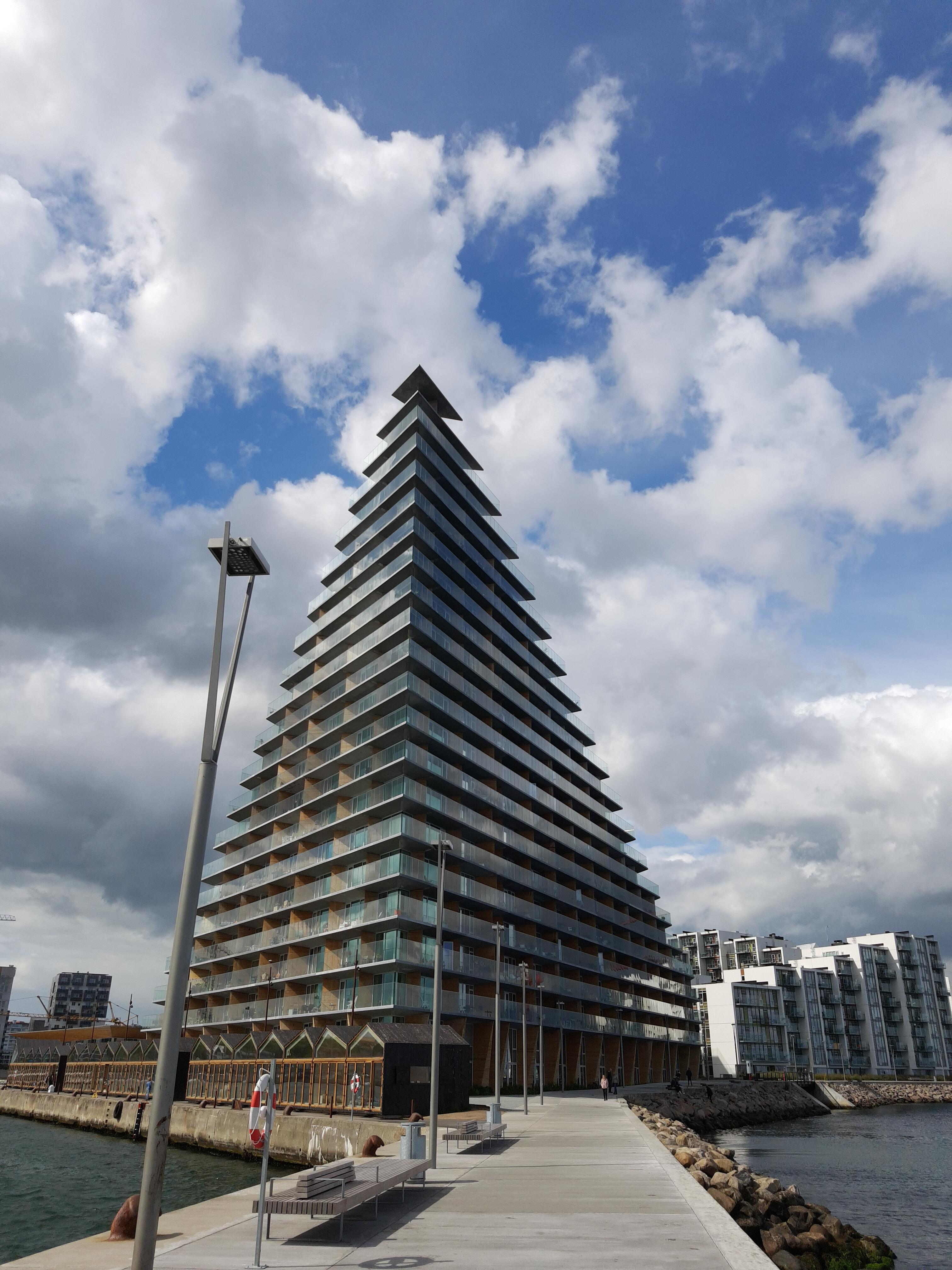 AARhus building in Aarhus Ø. View from the harbor.